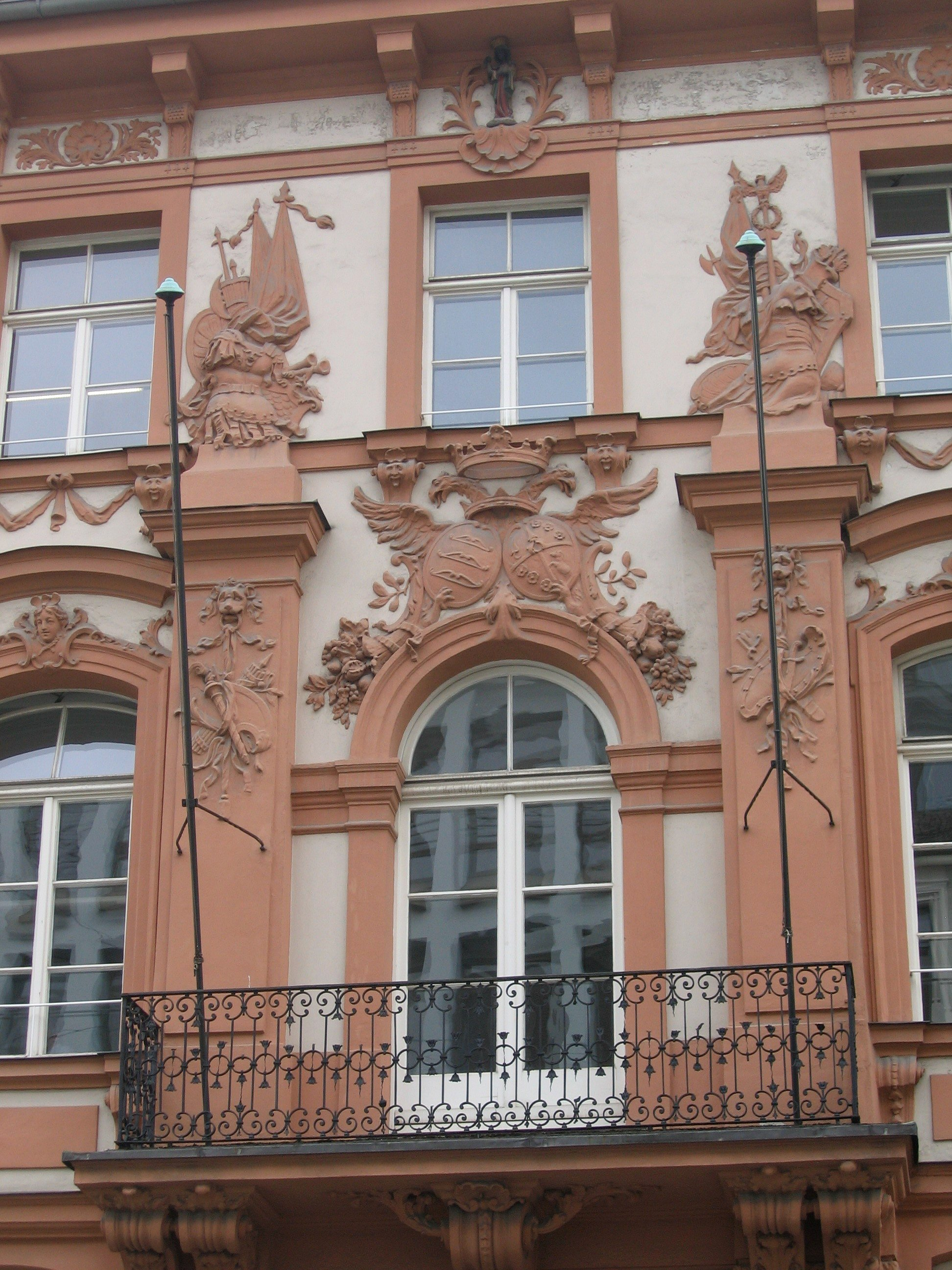 Prannerstraße 9; Palais Gise, auch Palais Arco genannt, jetzt Teil des Erzbischöflichen Ordinariats, viergeschossiger Satteldachbau mit reich stuckierter Spätrokoko-Fassade, wohl von Carl Albert von Lespilliez, um 1760, nach schwerer Kriegszerstörung insbesondere im Inneren Wiederaufbau durch Hans Uecker, 1949. D-1-62-000-5486